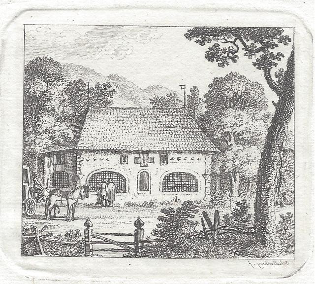 Reisende beim Besuch des Beinhauses zu Murten. Ansicht der Straßenseite.